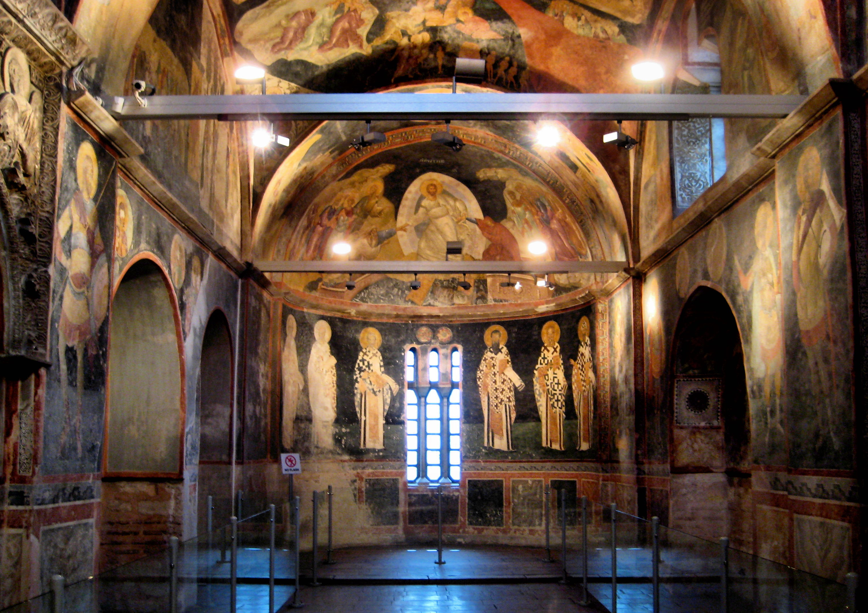 St. Irene